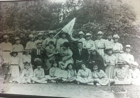 קבוצה מחניכות תנועת "צופיות ציון" ובמרכז מזל מוצרי - Egyptian Jewish female Youth group "Girlscouts of Zion" established by the journalist Mathilde (Mazal) Mosseri (center of the picture) during WWI.